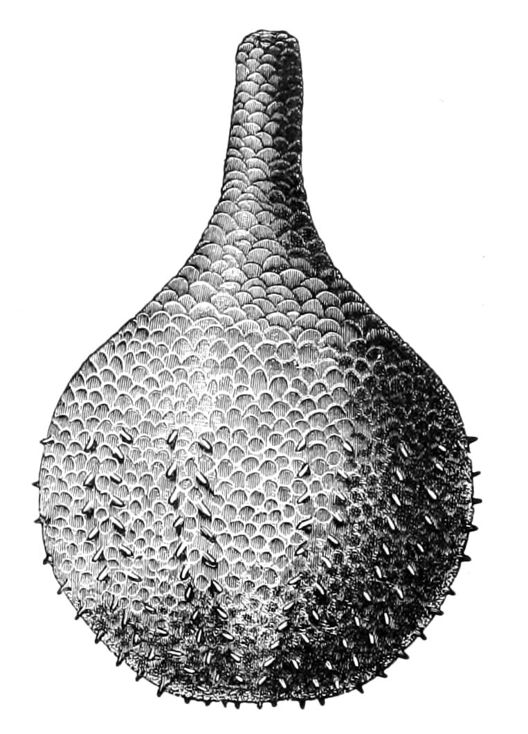 Rhopalodina